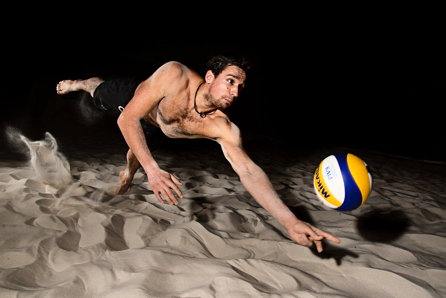 Jonathan Erdmann beim Shooting am Olympiastützpunkt in Berlin